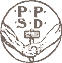 Logo Polska Partia Socjalno-Demokratyczna Galicji i Śląska Cieszyńskiego, utworzone przed 1919, prawdopodobnie jeszcze w XIX wieku - wiec public domain. Zrodlo: [1]